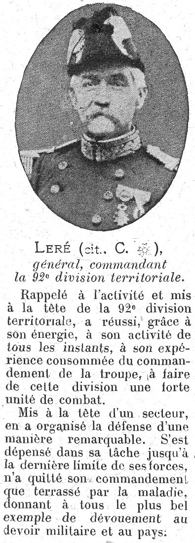 extrait du tableau d'honneur, supplément de la revue l'illustration en 1915. Général Leré